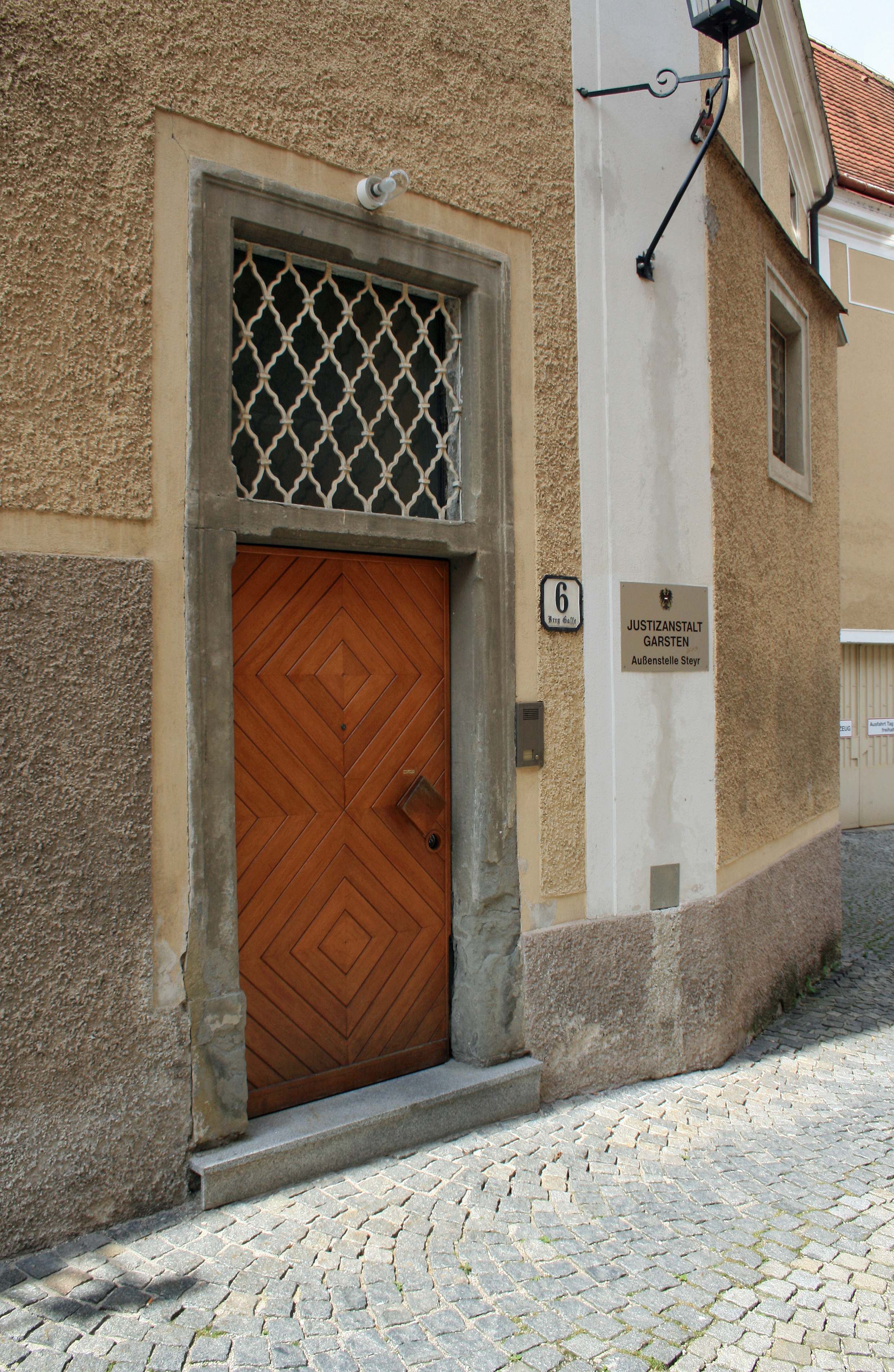 Die Außenstelle der Justizanstalt Garsten in der Steyrer Berggasse 6